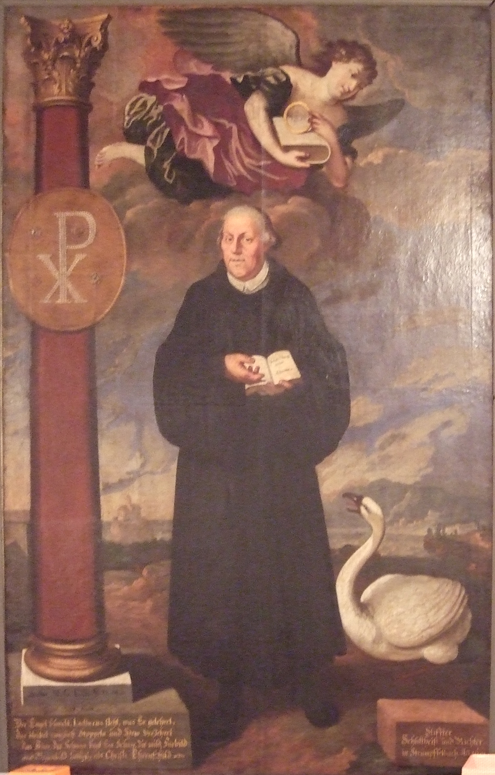 Strümpfelbach im Remstal - Kirche - Lutherbild Gemalt von J.A. List, gestiftet vom Schultheiß Chirurgus Knauß und entworfen von dem gelehrten Pfarrer M(agister) G(eorg) L(udwig) Sch(midlin)